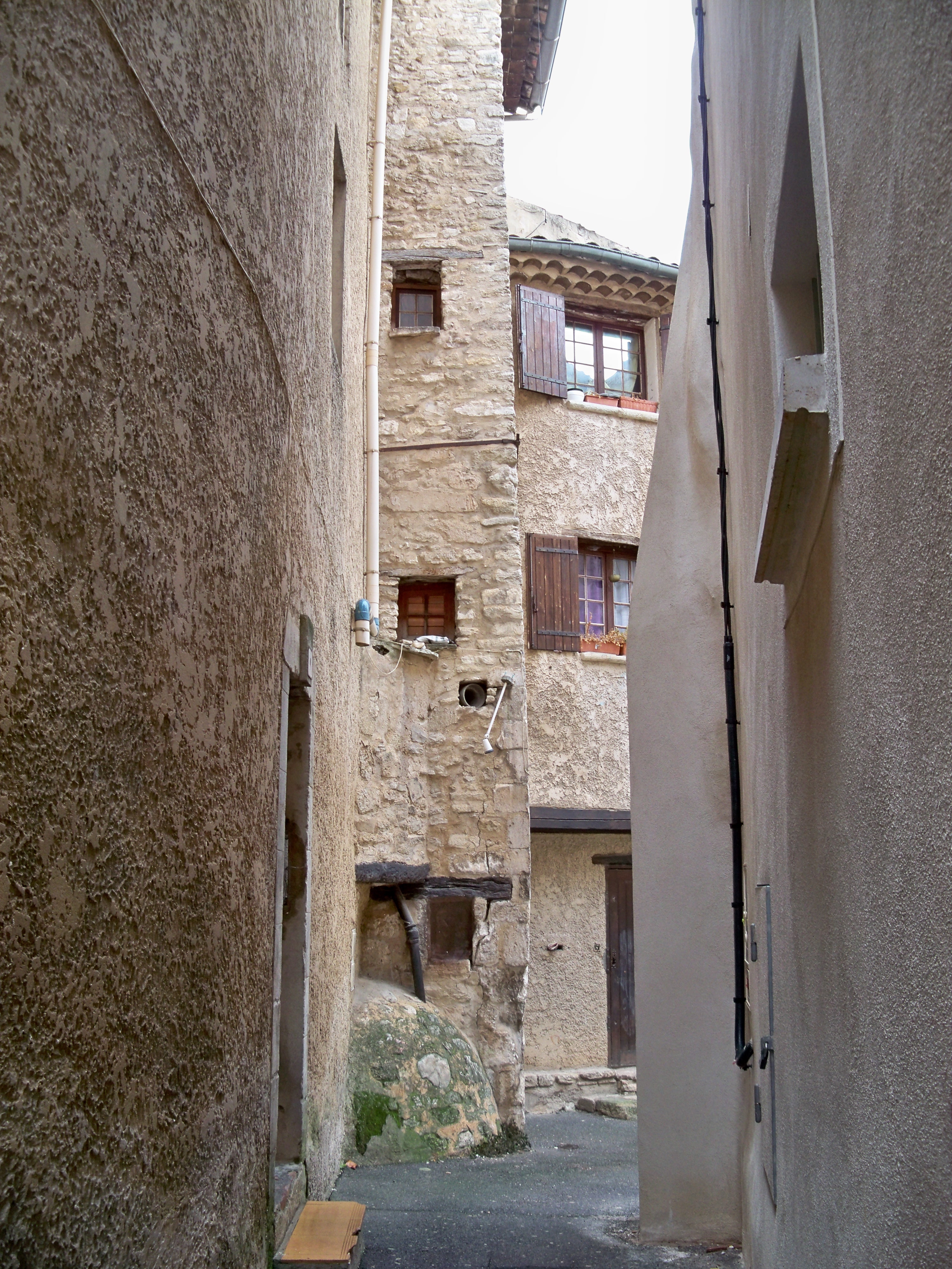 Rue des anciennes prisons à Apt, Vaucluse, France